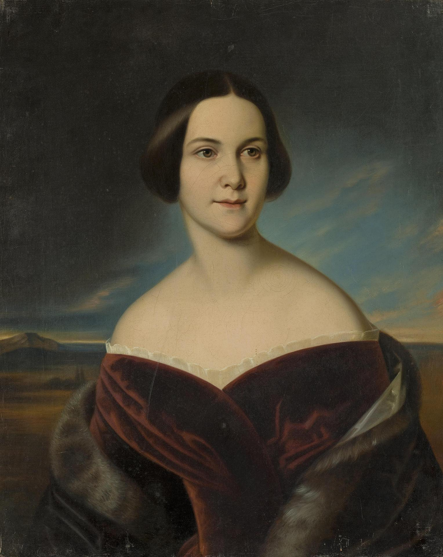 Вера Ивановна Анненкова, урож. Бухарина (1813-1902)